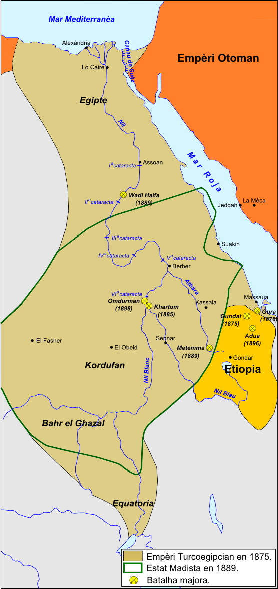 Empèri Turcoegipcian.